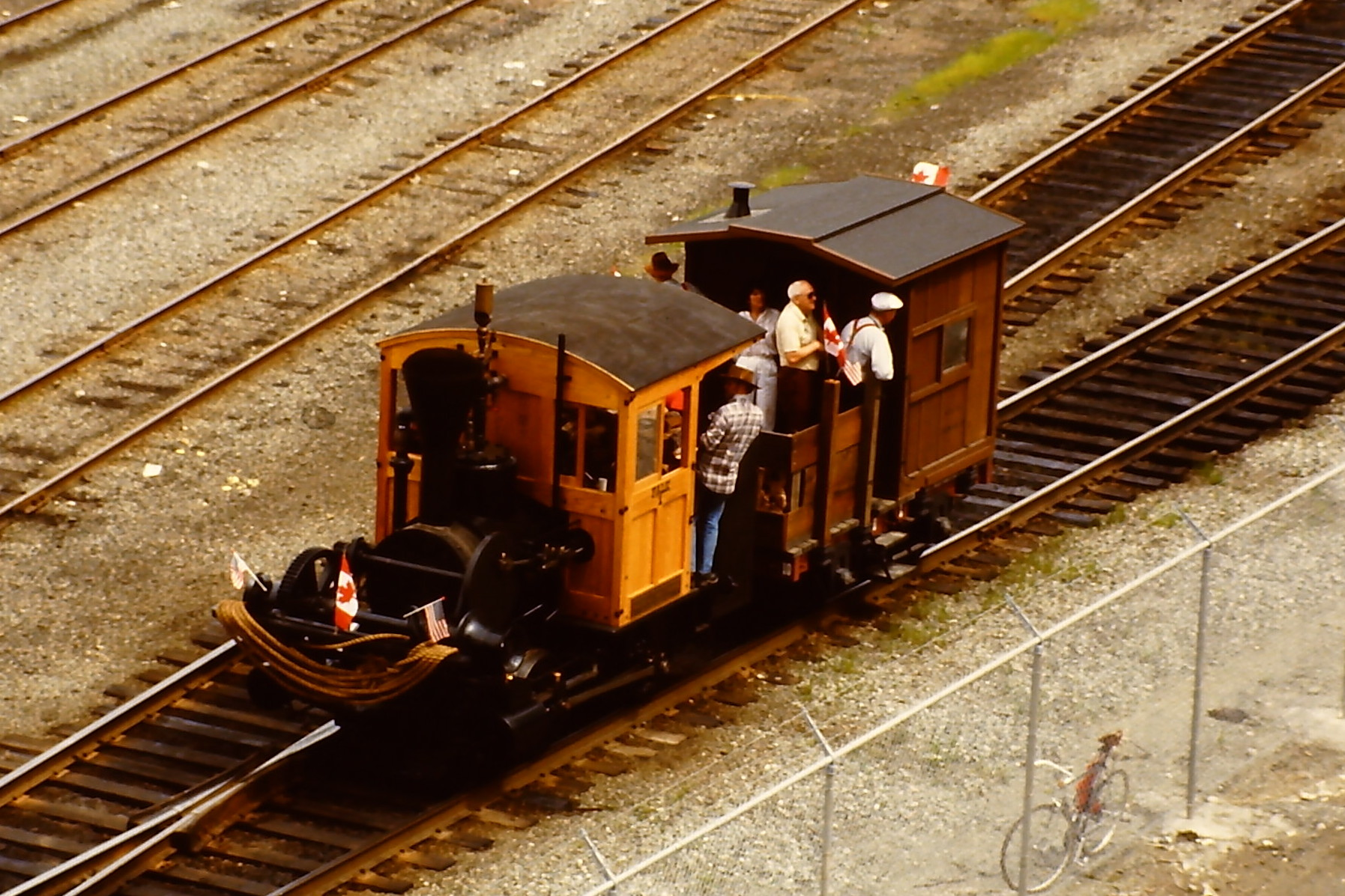 Falk Nummer 1 auf der SteamExpo 86 in Vancouver